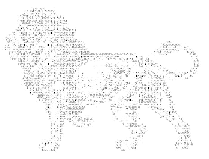 León creado con arte ascii.